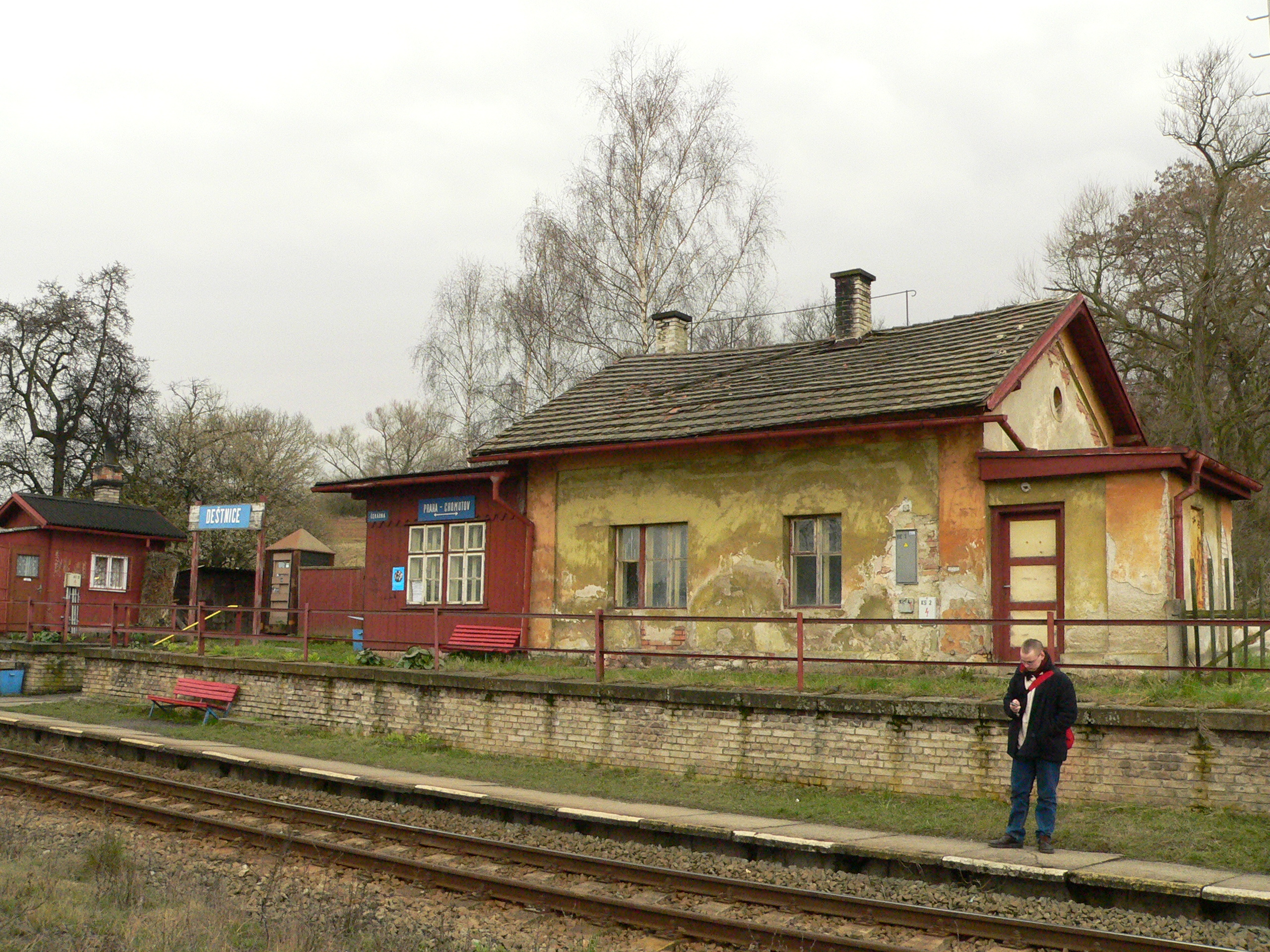 Strážní domek u hlásky Deštnice v trati Praha - Chomutov km 78, březen 2007